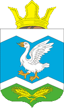 Герб Шадринского района Курганской области